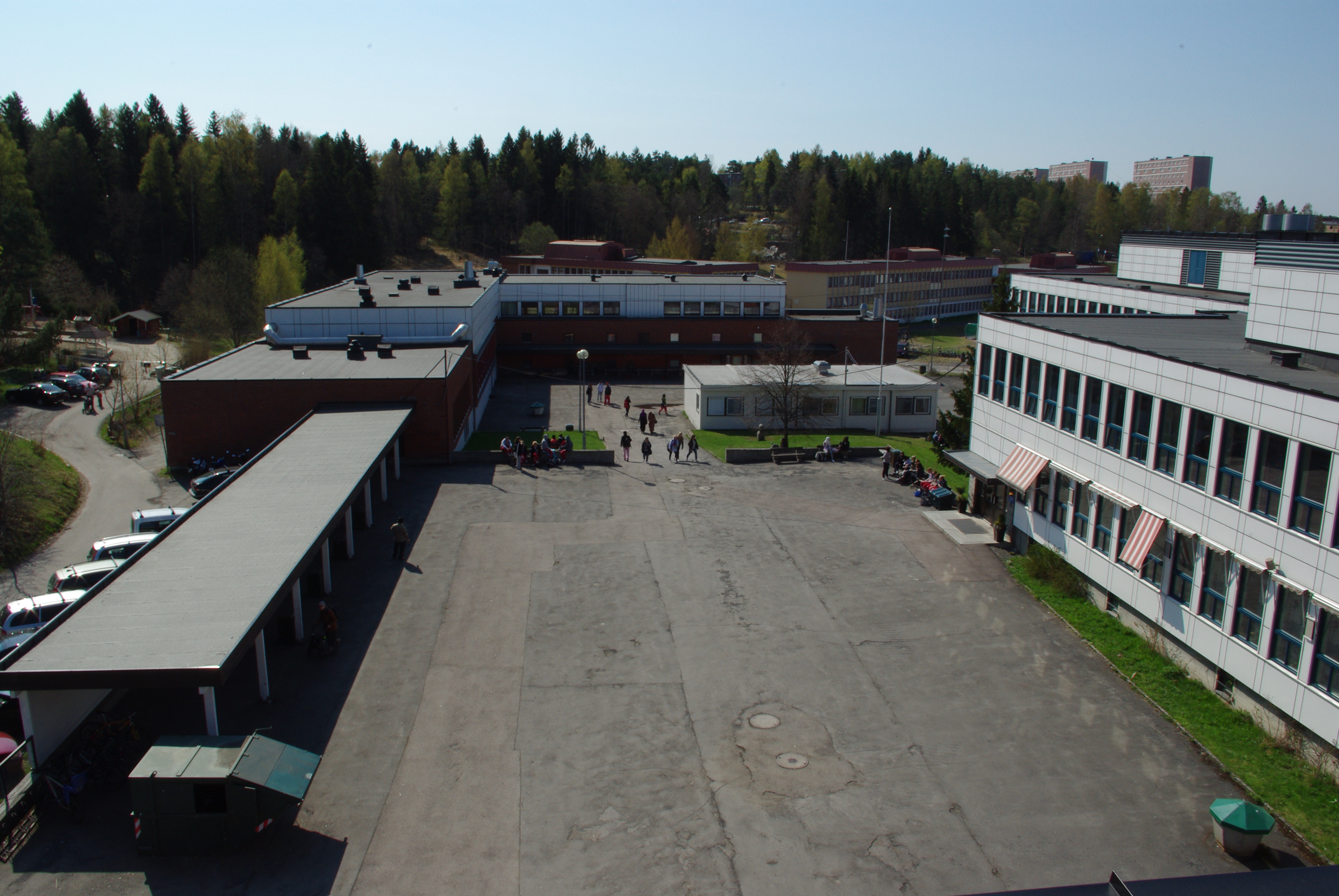 Ulsrud videregående skole, sett fra toppen av A-bygget.